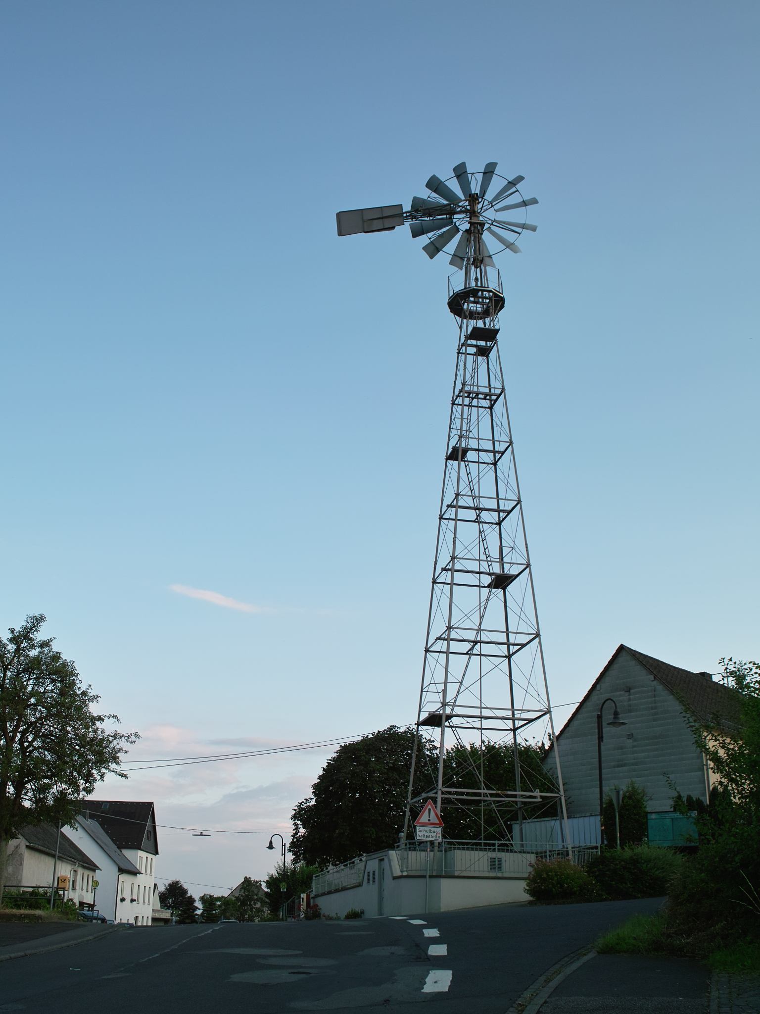 Windrad mit Wasserpumpstation in Weltersburg, erbaut 1912